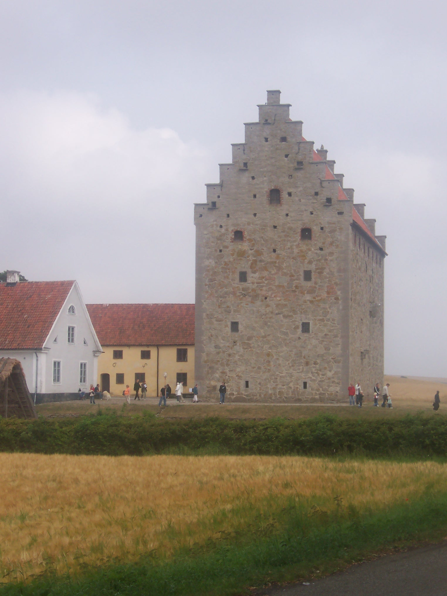 Glimmingehus in Skåne, Sweden